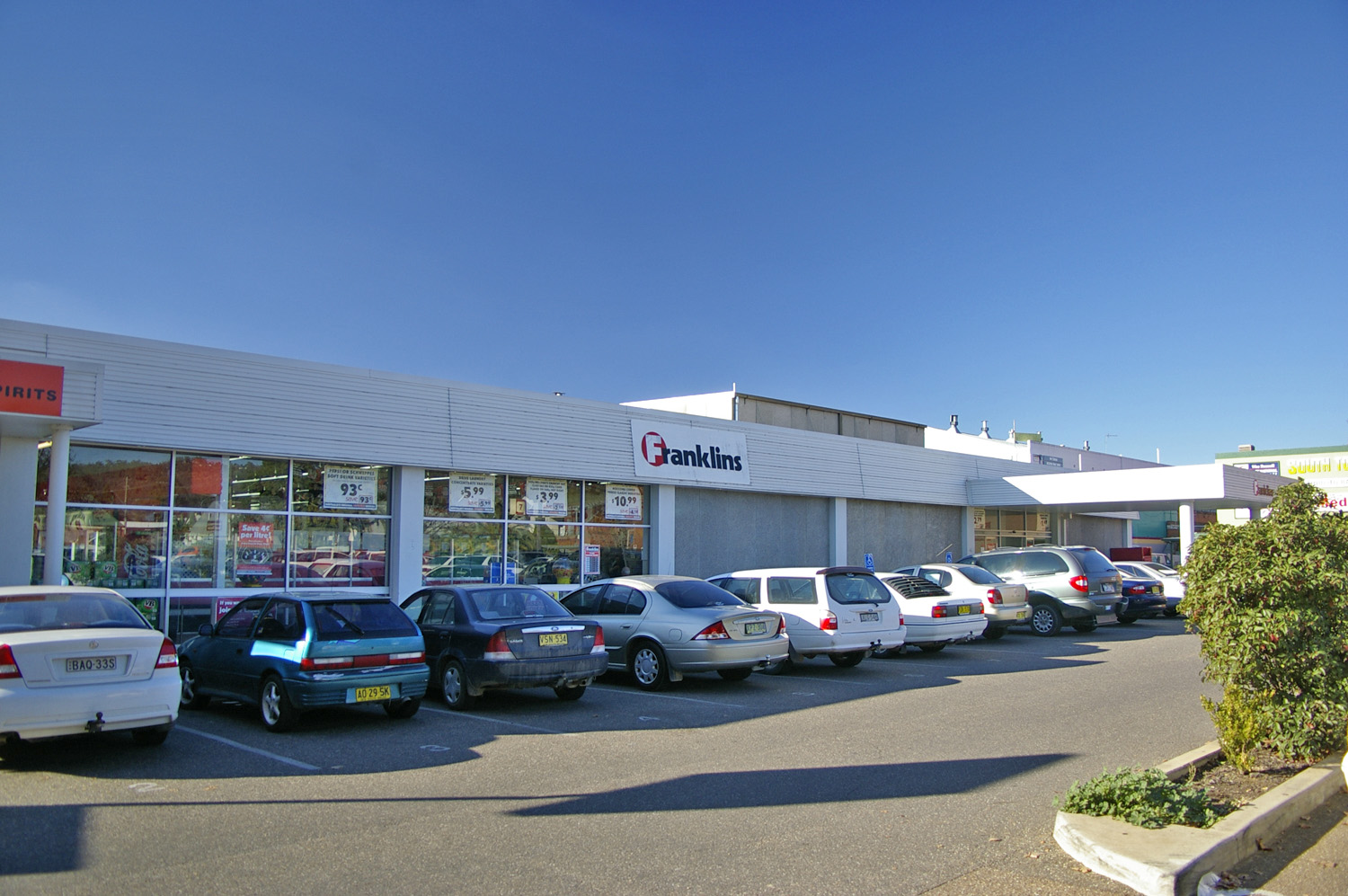 Franklins Supermarket. Wagga Wagga